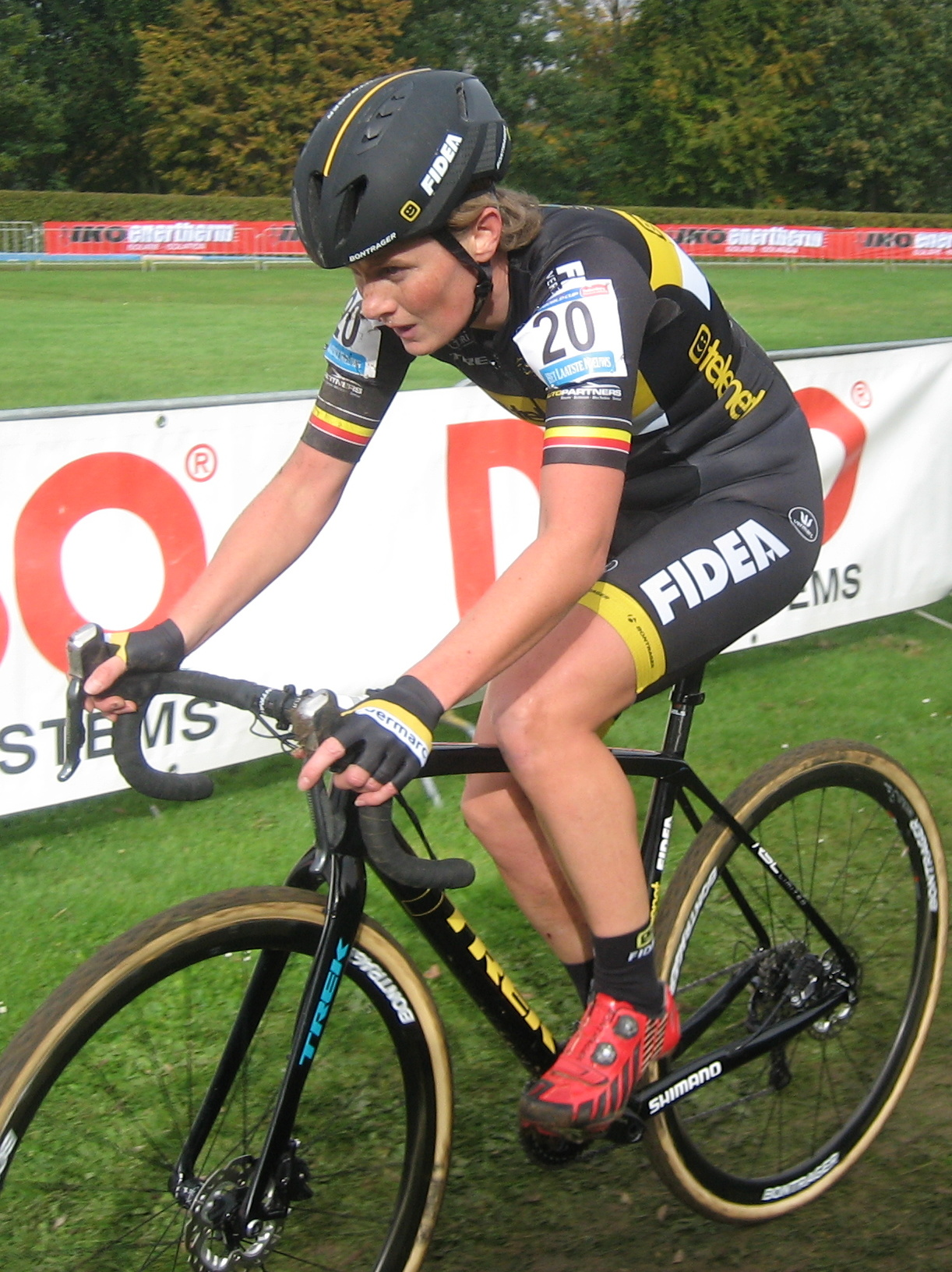 Loes Sels in de wereldbeker veldrijden op de Cauberg in Valkenburg, Nederland, op zondag 23 oktober 2016.